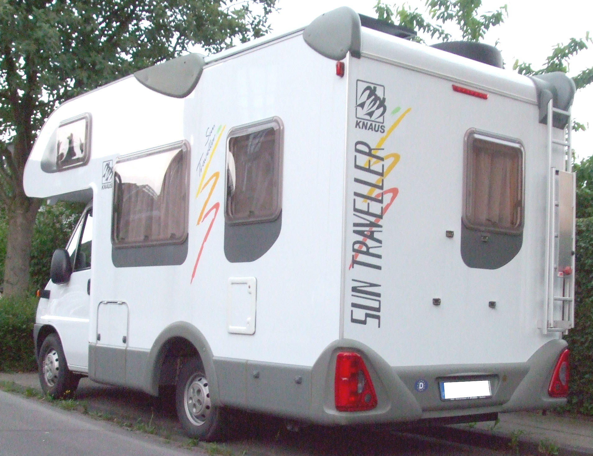 Knaus Alkoven-Wohnmobil „Sun traveller“ (wahrscheinlich Sun traveller 605 MF) auf Basis eines Fiat Ducato, 6,30 m lang, 3,5 to Gesamtgewicht